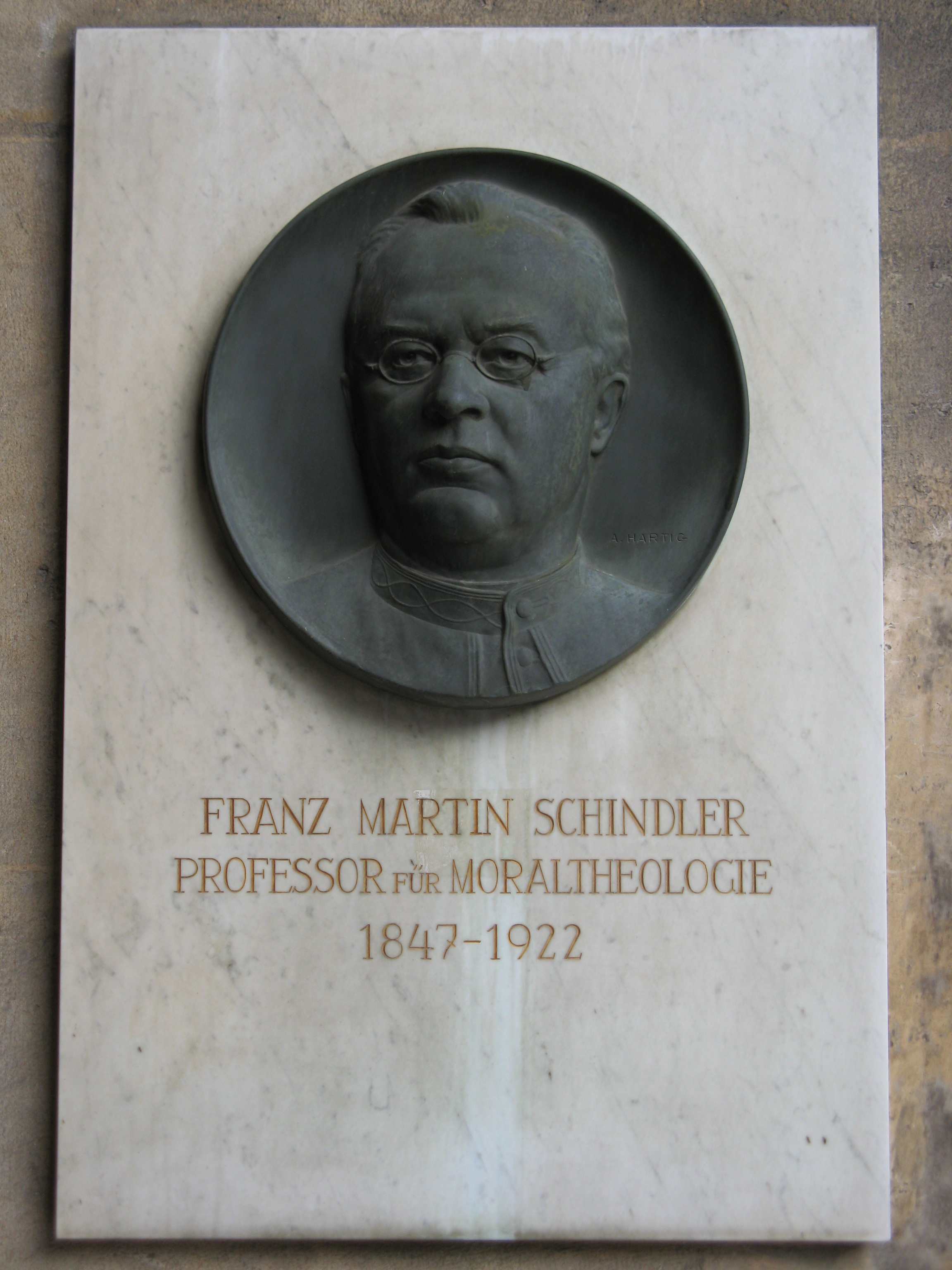 Wien, Universität, Ehrenhalle in den Hofarkaden: Relief Franz Martin Schindler (Bildhauer: Arnold Hartig).